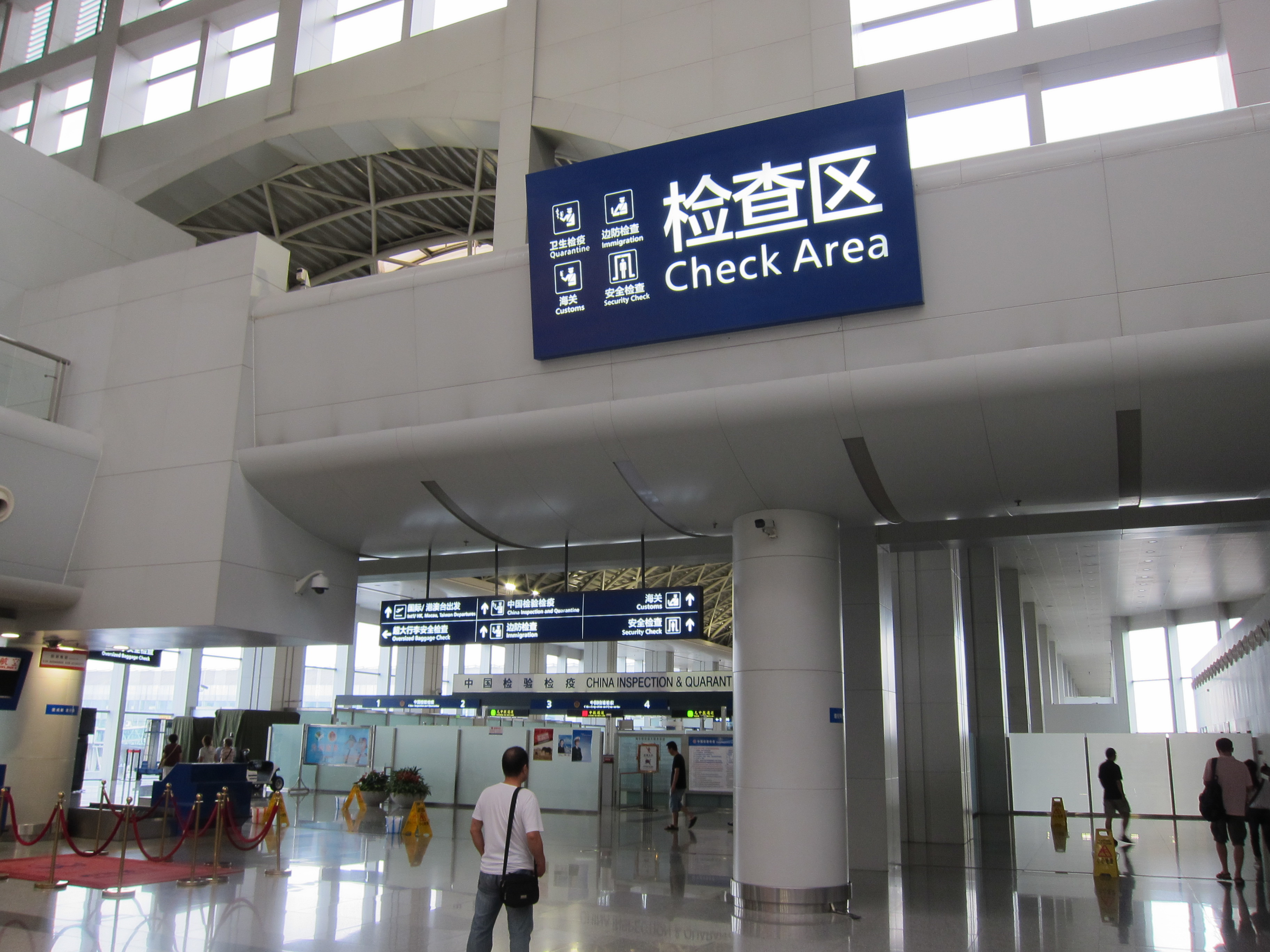 IMG_4116-2.jpg